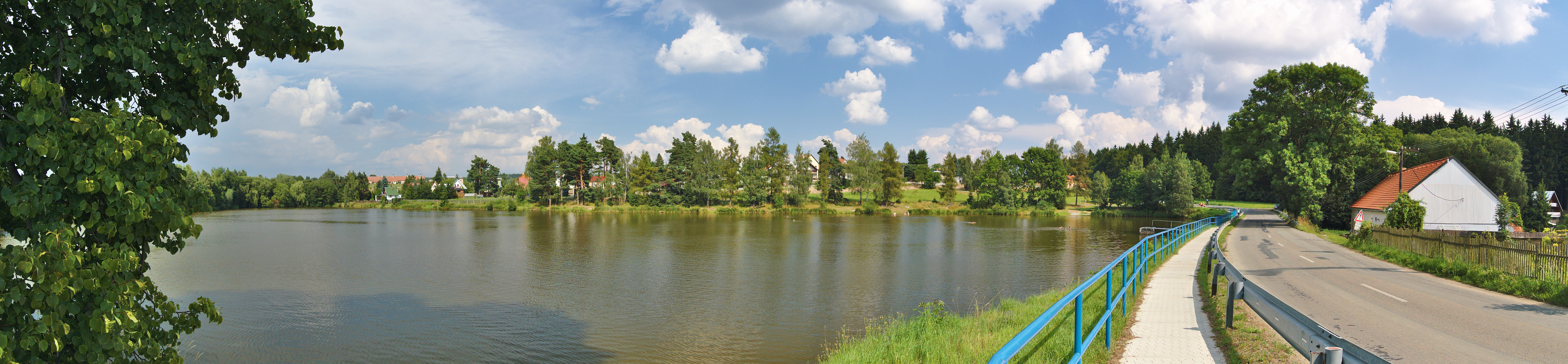 Rybník mezi Houskem a Molenburkem, Vysočany, okres Blansko